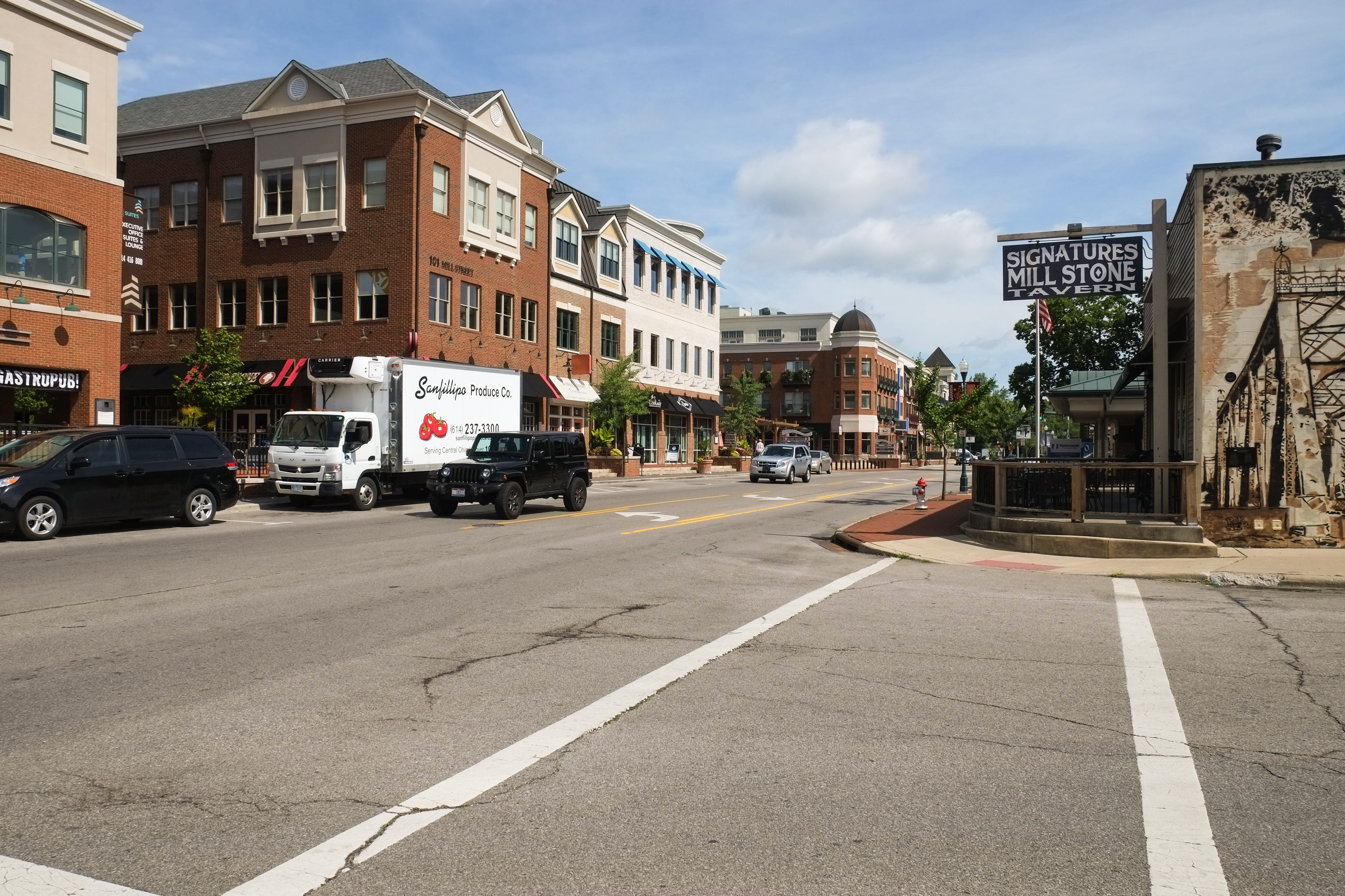 Gahanna, OH